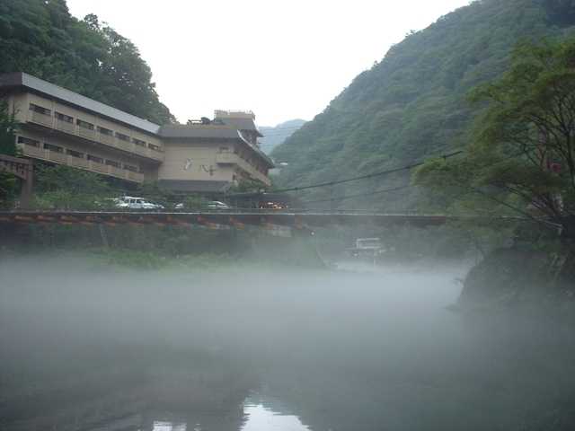 旭川上流、湯原温泉の湯煙。岡山県真庭市（撮影時には真庭郡湯原町）。